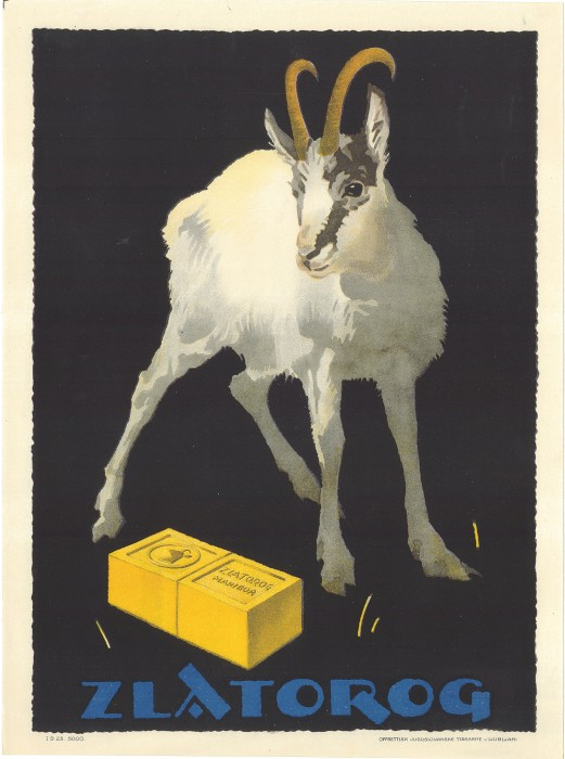 Plakat za Zlatorog